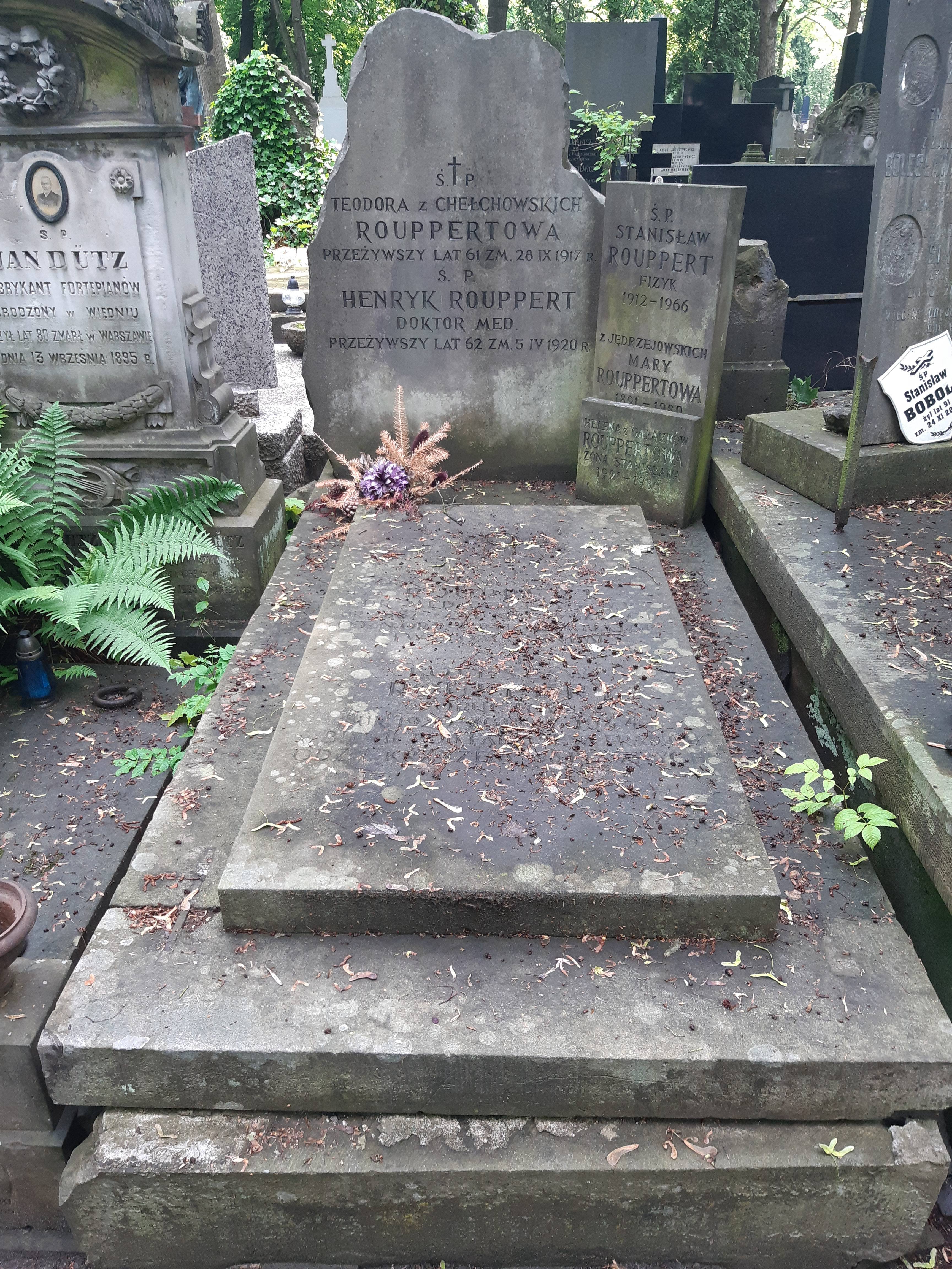 Grób Stanisława Roupperta na Cmentarzu Powązkowskim